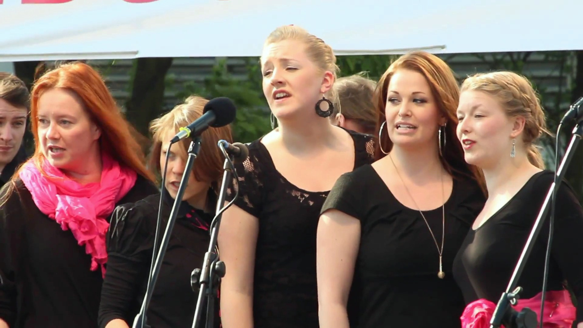 Sopot. Festiwal Mundus Cantat 2012, fińska grupa Con Caronca.